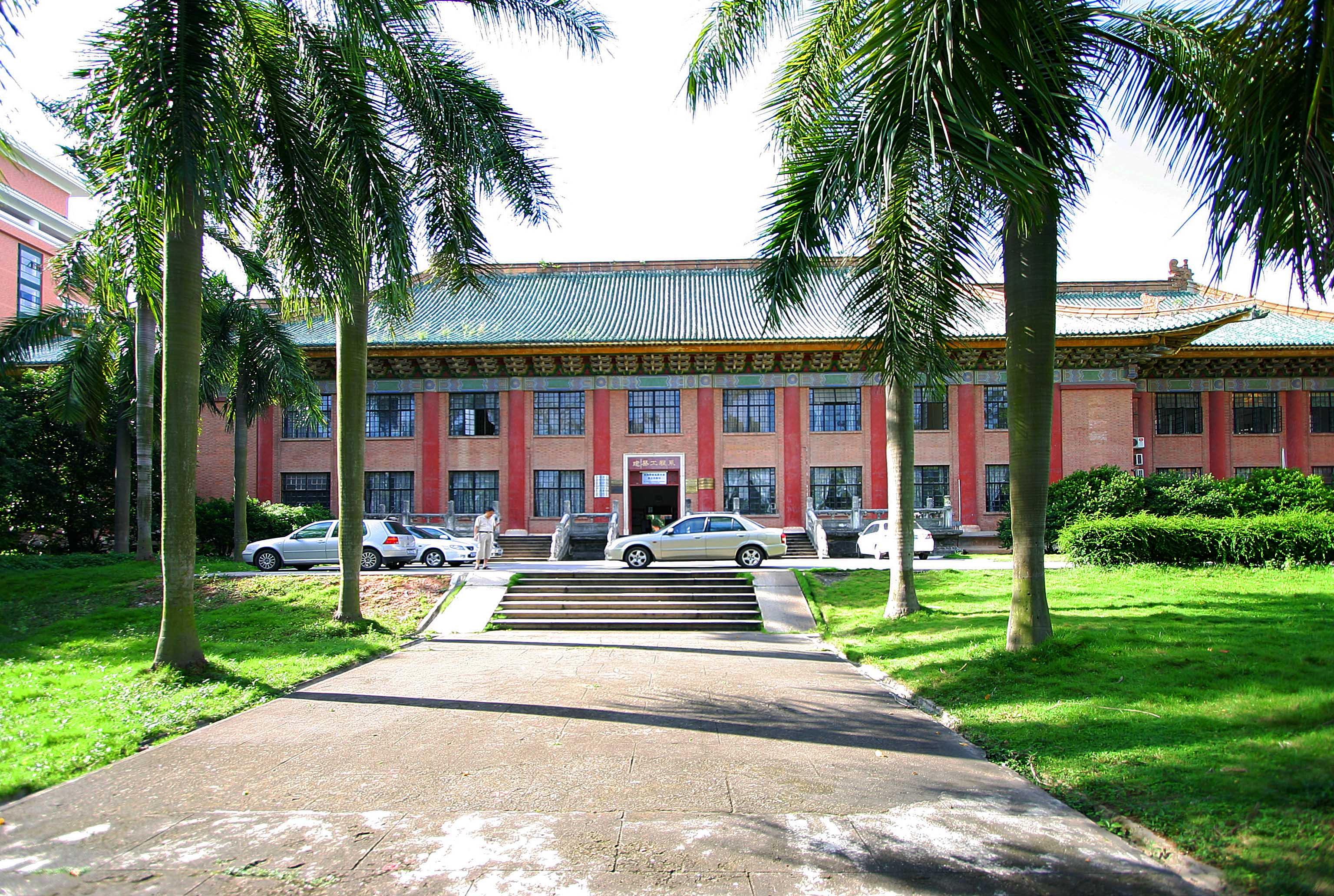 华南理工大学7号楼（建筑工程系），原国立中山大学理学院化学工程教室